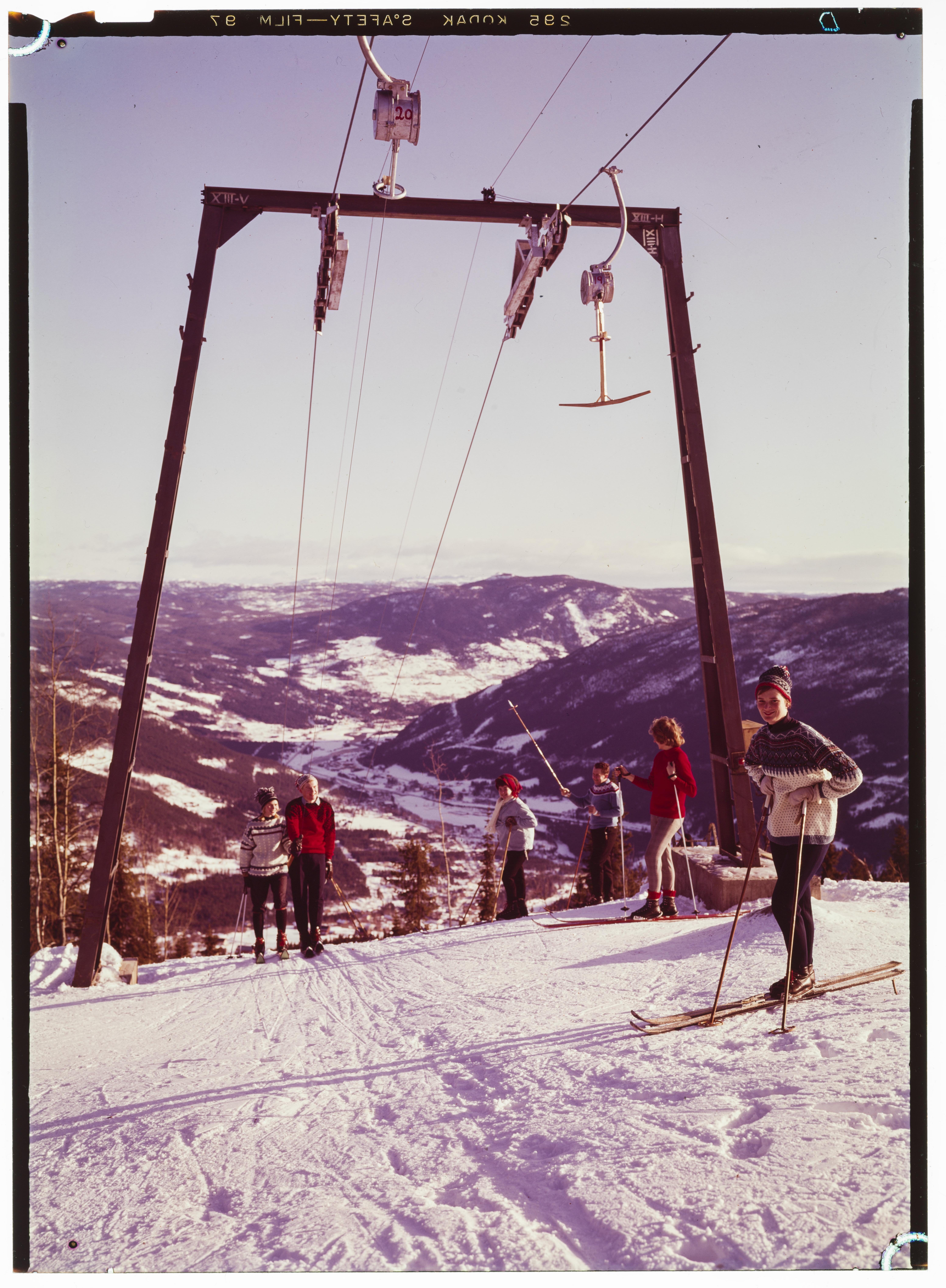 Bildet er hentet fra Nasjonalbibliotekets bildesamling. Anmerkninger til bildet var: Tittel er hentet fra emballasje. Golsfjellet, Gol, Buskerud